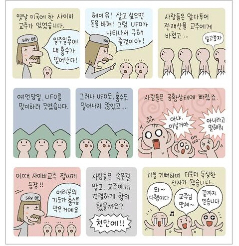 사이비교주